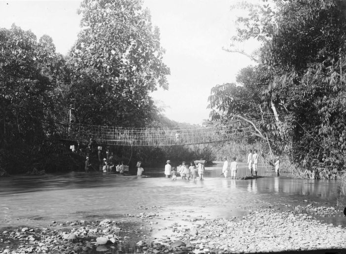 Negatief. Een groep loopt door de rivier Nalbessy tussen Enabeloro en Waeno in Zuid-Boeroe, daar de rotan hangbrug slecht is onderhouden en in de regentijd te gevaarlijk is om te betreden. Bij een overstroming (bandjir) komt het water tot aan de brug